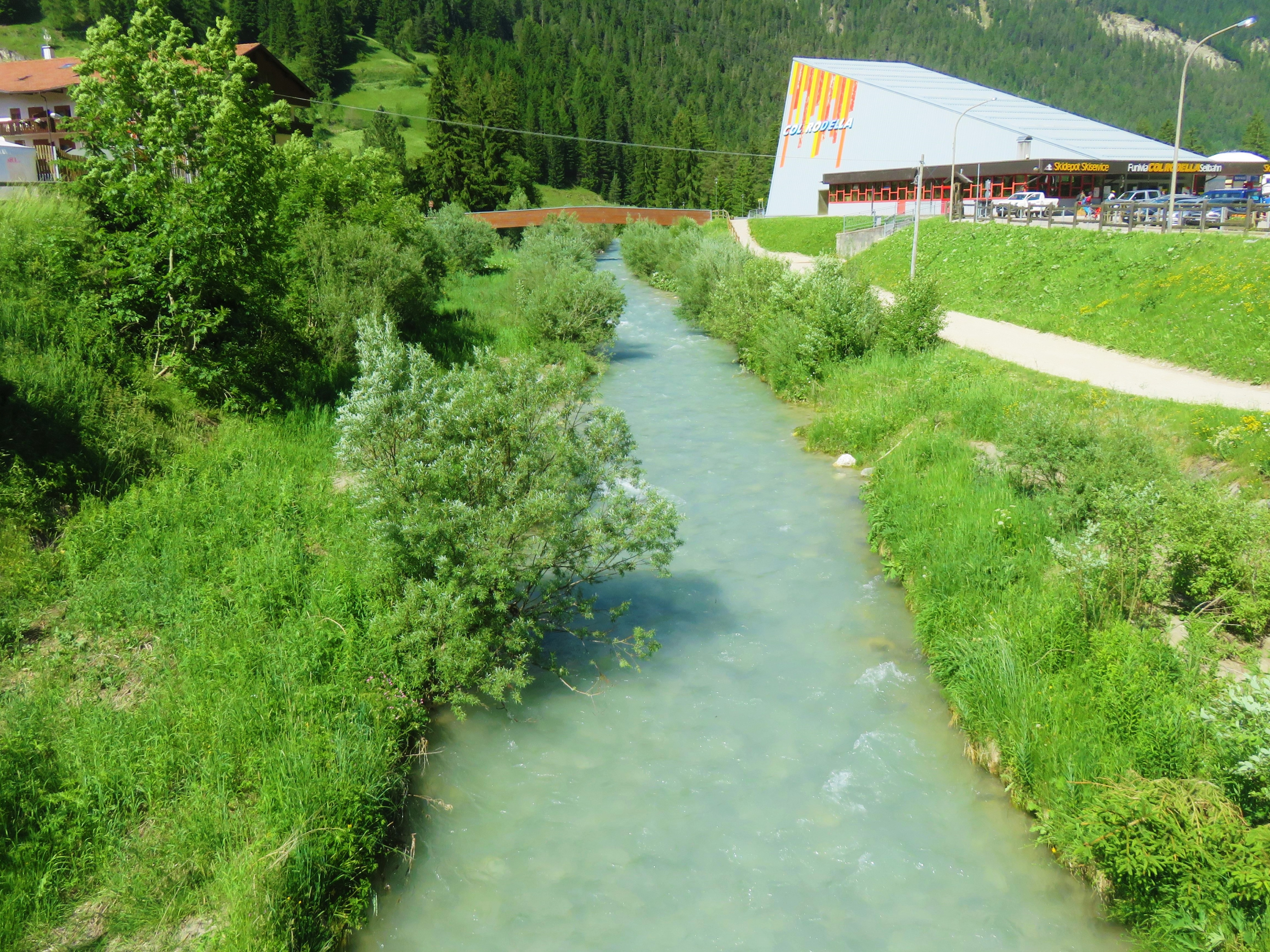 Il torrente Avisio visto verso monte, dalla zona del parcheggio della funivia per il Col Rodella. E' visibile la stazione della funivia.